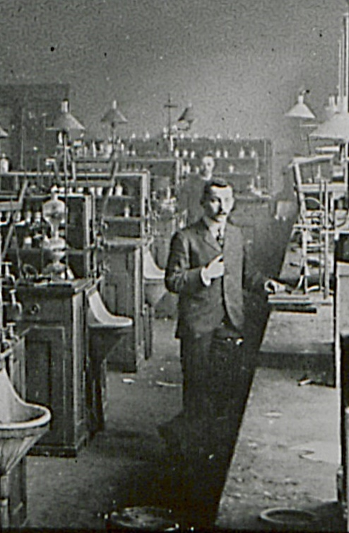 Erich Ebler (* 8. März 1880 in Mannheim; † 23. Januar 1922 in München), Professor der Chemie, in der Universität Heidelberg